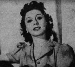 Rosita Serrano en 1941. Rosita Serrano, nombre artístico de María Ester Aldunate del Campo1​n 1​ (Quilpué,2​ 10 de junio de 19121​n 2​-Santiago de Chile, 6 de abril de 1997), fue una cantante y actriz chilena de gran éxito en Alemania en el periodo 1937-1943, cuando llegó a ser conocida como die chilenische Nachtigall ('el Ruiseñor Chileno').3​